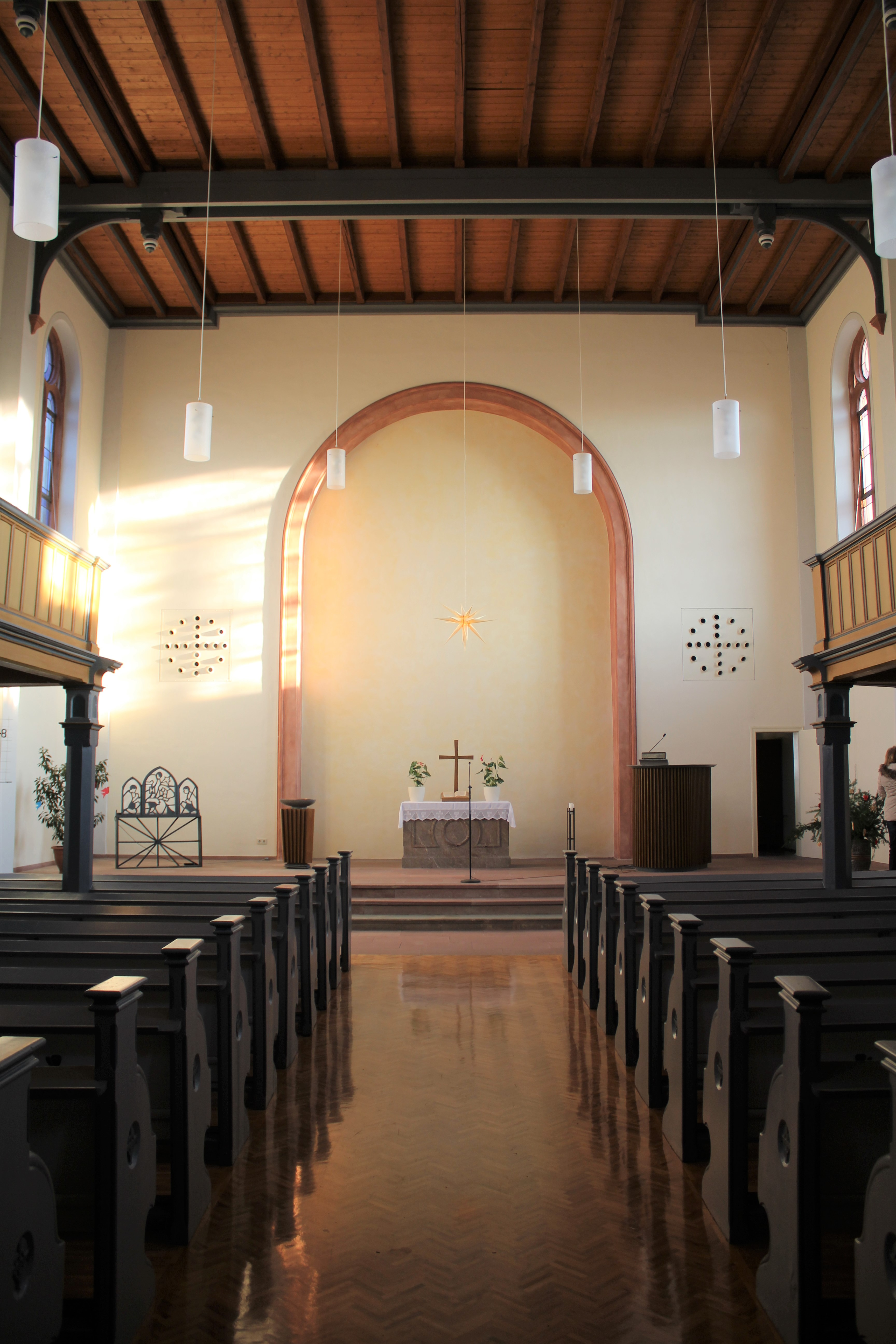 Evangelische Kirche Biskirchen, Gemeinde Leun, Lahn-Dill-Kreis, Hessen, Deutschland